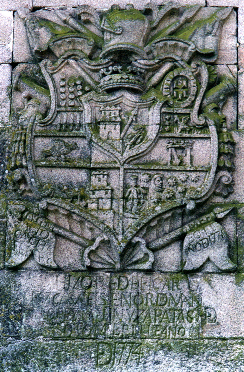 Escudo de la Casa Grande de Pereira de Arriba (A Cervela) Incio